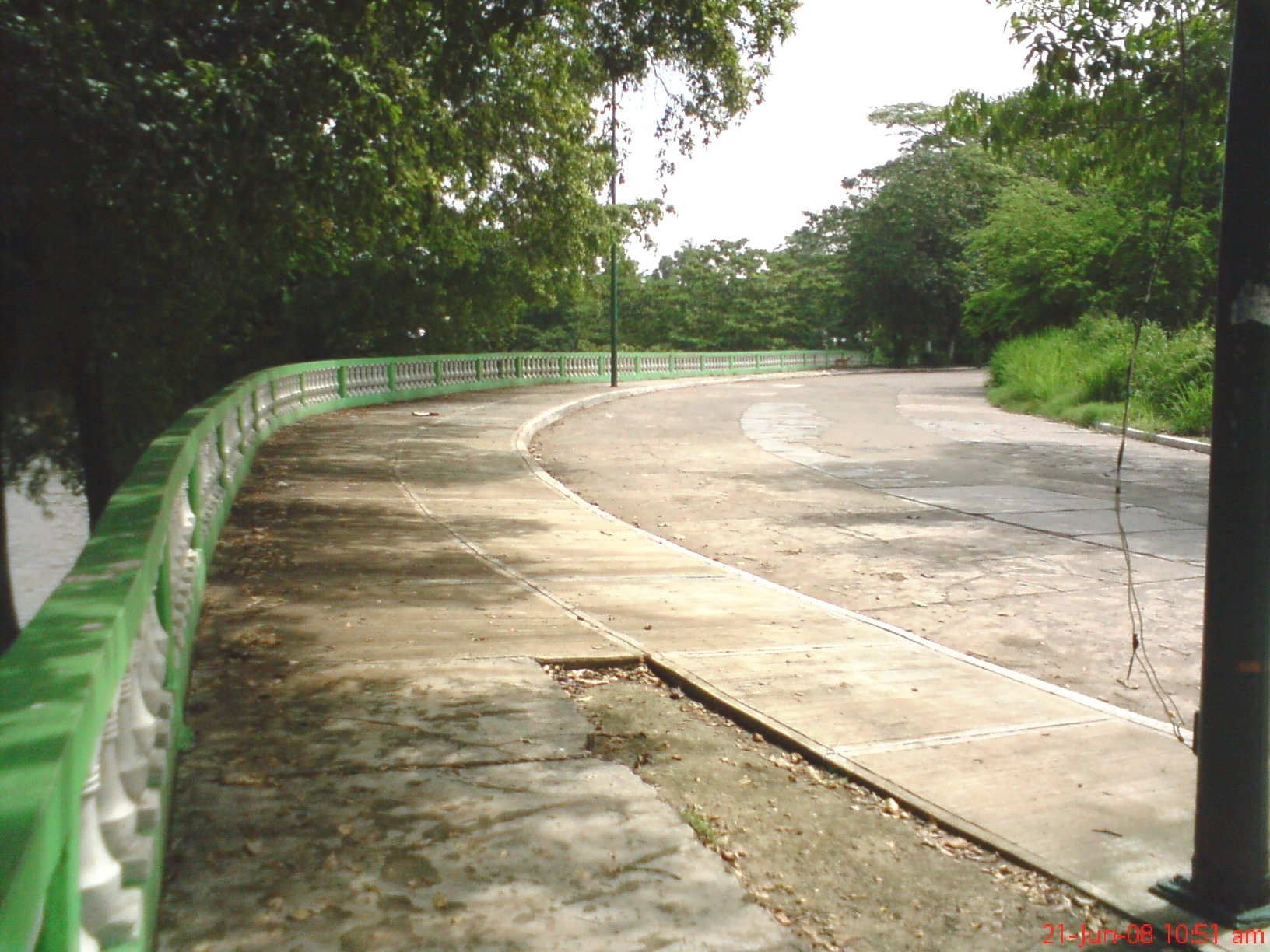 Antiguo malecón de Tenosique, actualmente se esta adaptando para funcionar como bordo de protección contra inundaciones